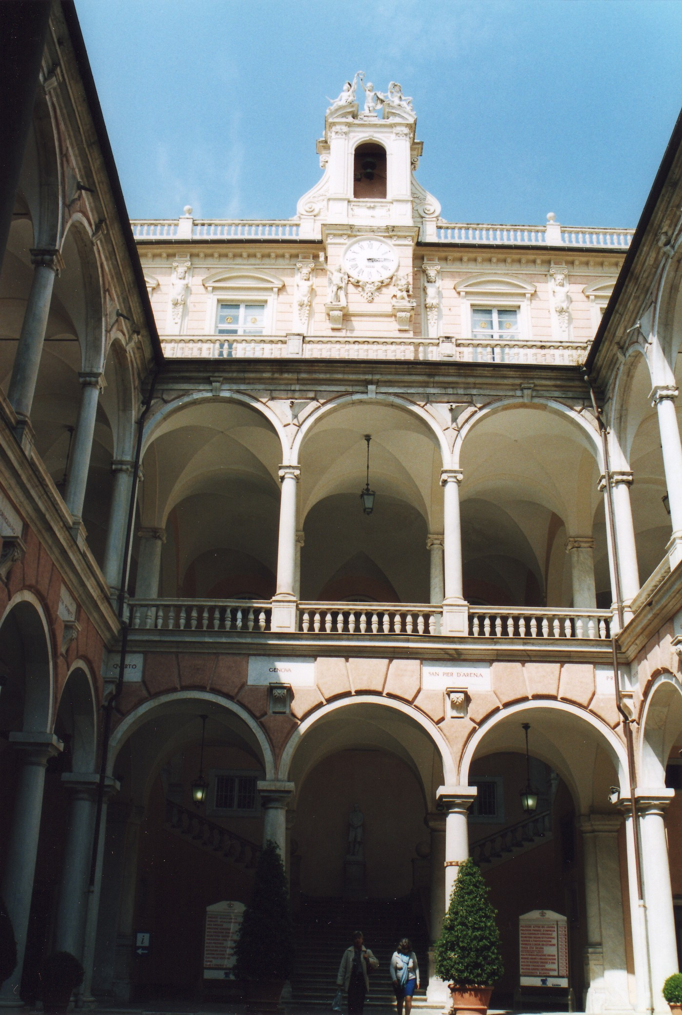 cortile interno del Municipio di Genova, Palazzo Doria Tursi.